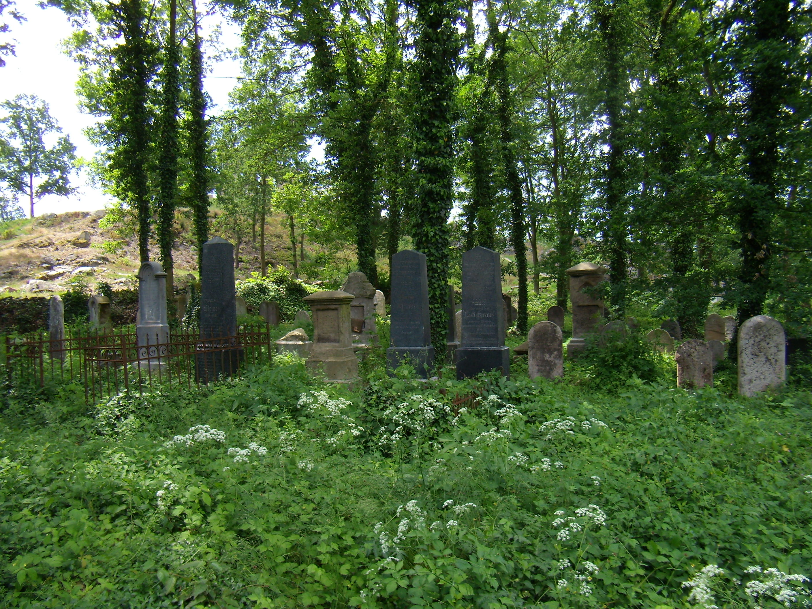 Osek u Rokycan ŽH